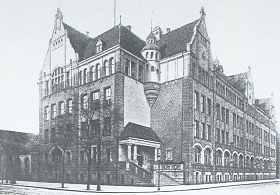 Skizze um 1910